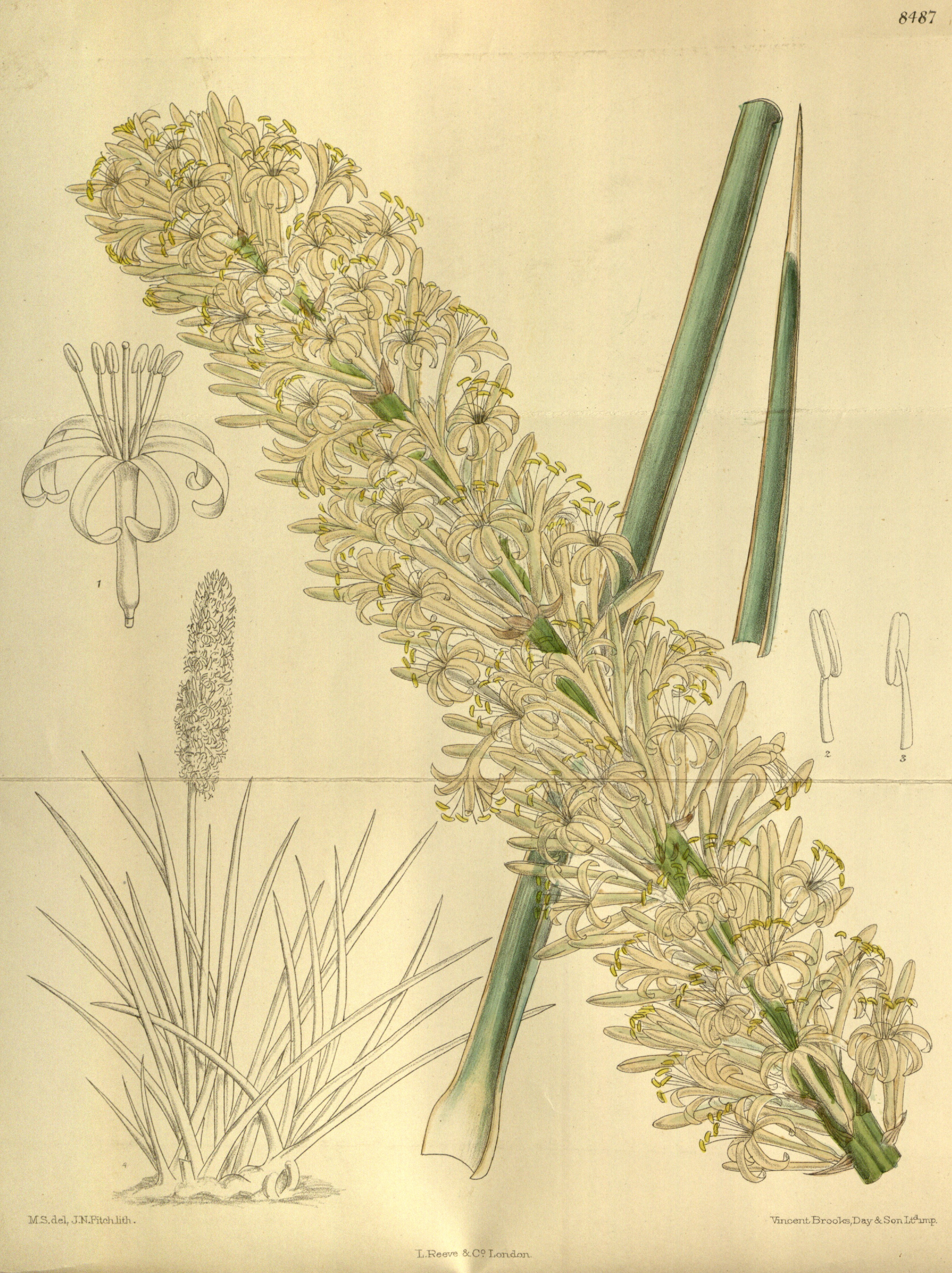 Sansevieria aethiopica, Asparagaceae, Nolinoideae